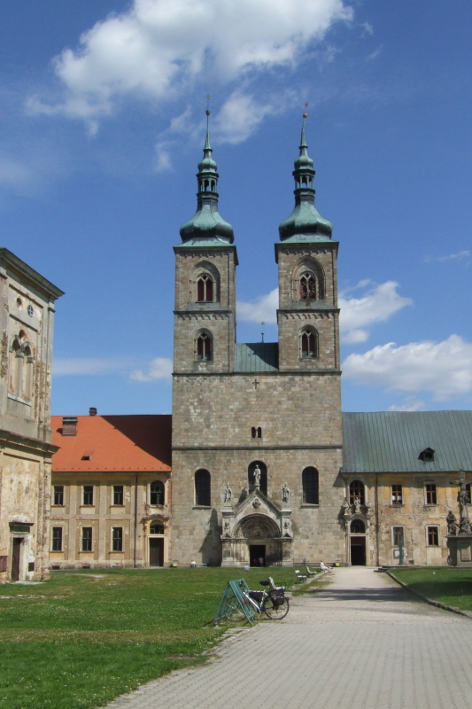 Stift Tepl - Turmfassade der Klosterkirche